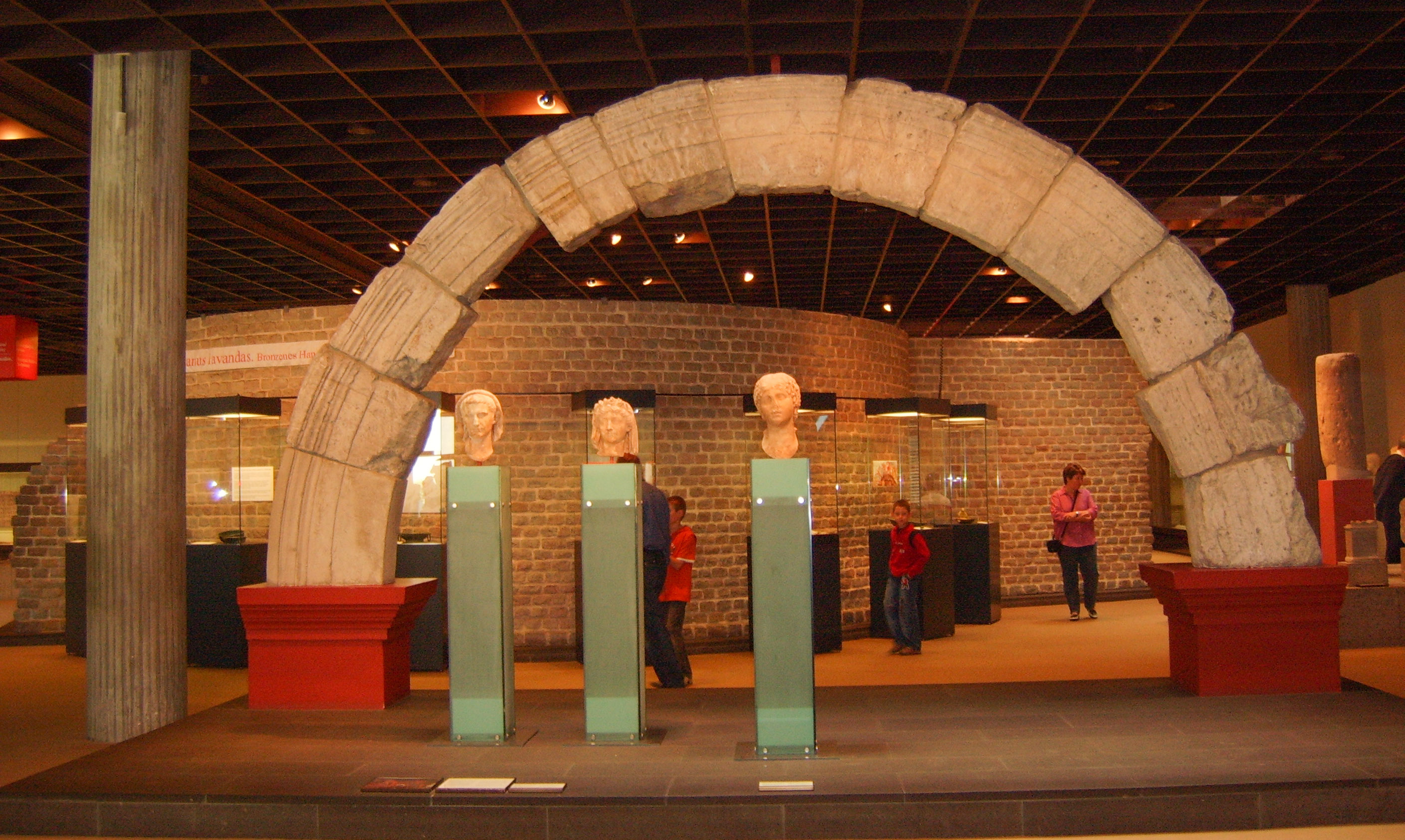 Bogen des röm. Nordtores der CCAA im RGM Köln